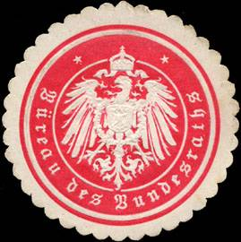 Sealing stamp Title: Bürau des Bundesraths Description: rot, weiss, geprägt Place: size: 4 cm